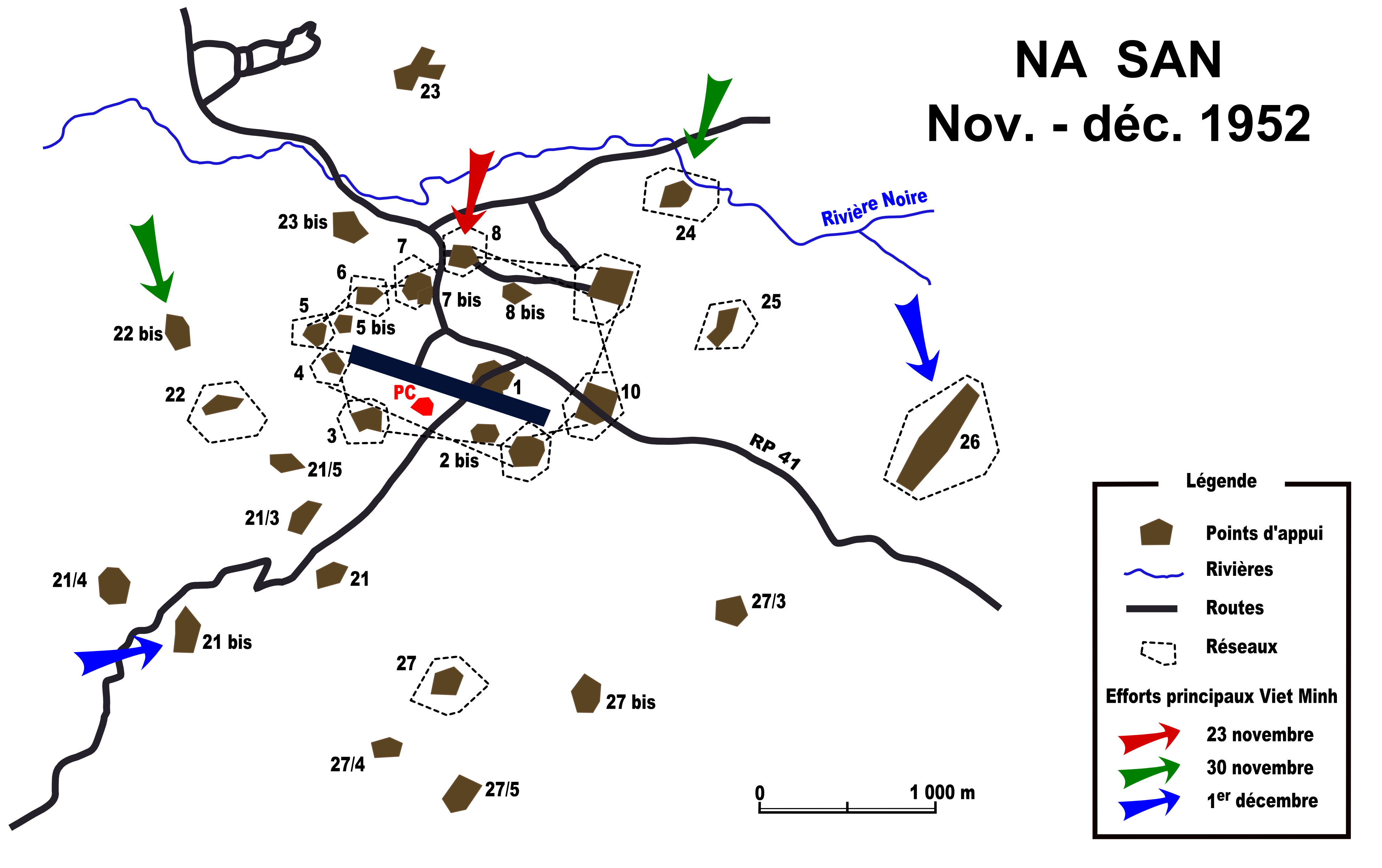 Plan du camp retranché de Na San durant la guerre d'Indochine (nov déc 1952) - d'après le schéma reproduit dans le livre Mémoires, Fin d'un empire du général Salan page 352 et le plan dans l'ouvrage La Légion en Indochine d'Alain Gandy, page 102.